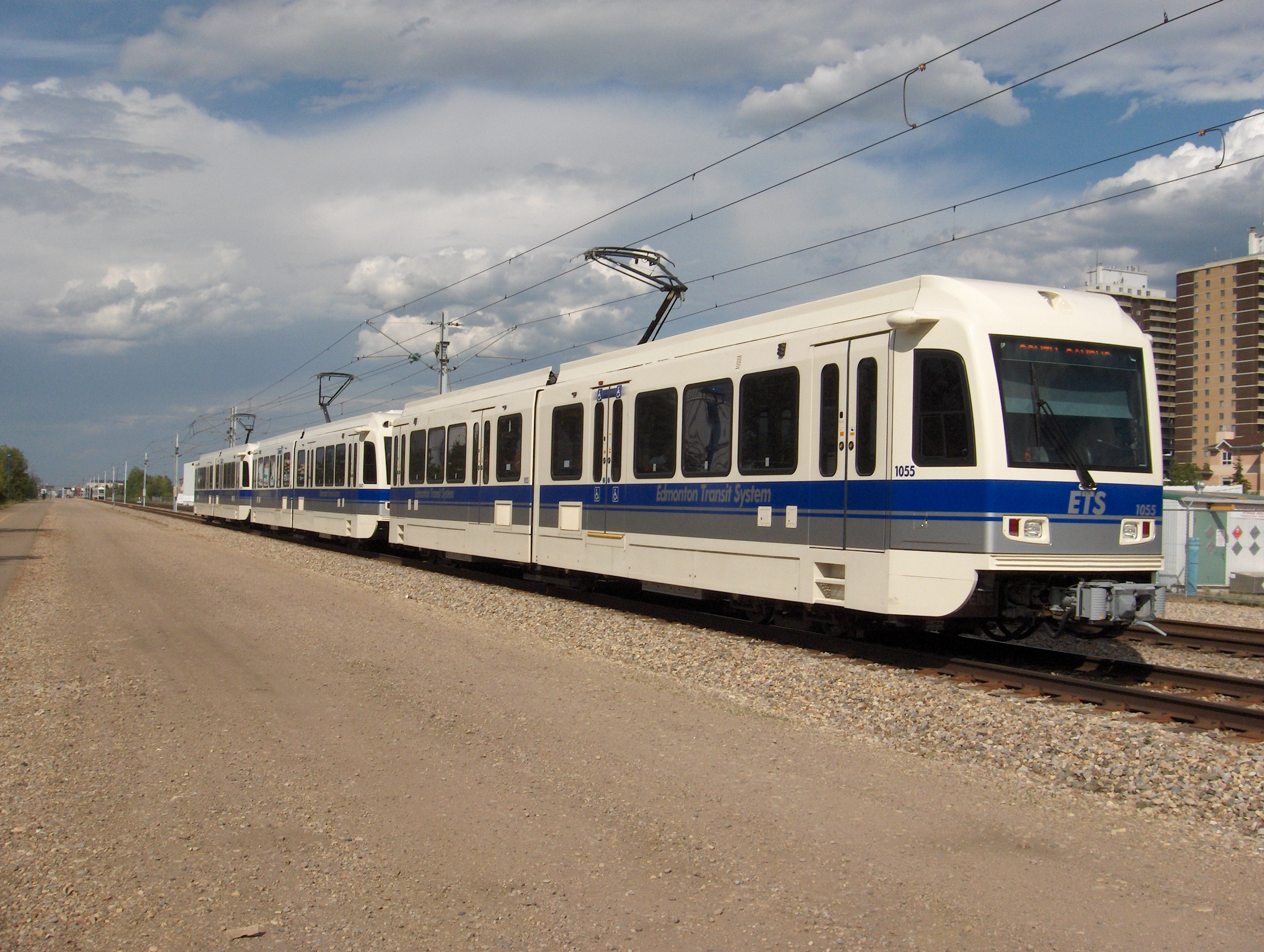 Трёхвагонной поезд из вагонов Siemens SD-160 (Edmonton LRT)